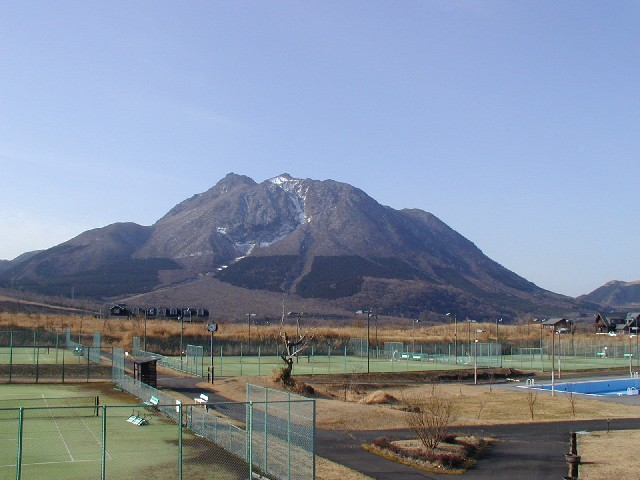 Yufu-dake lava dome in Tsurumi volcanic complex.